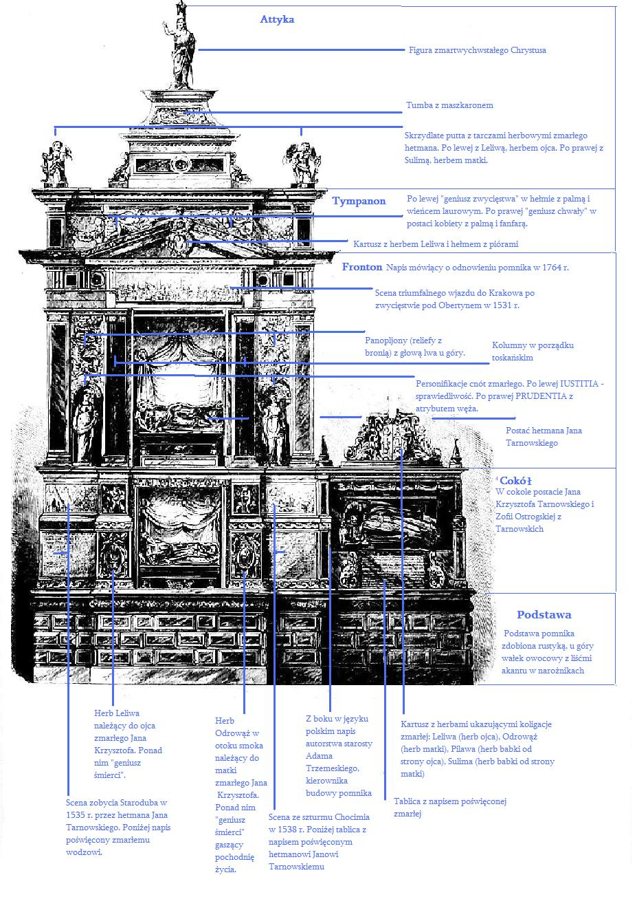 Architektura i symbolika pomnika Tarnowskich w Bazylice Katedralnej w Tarnowie